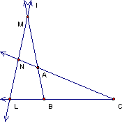 为梅涅劳斯定理上传的图像。 Exile绘于家中。